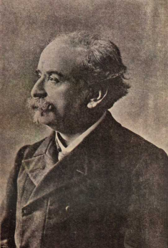 Miguel Agelo Pereira, Portuguese Composer 1843-1901.